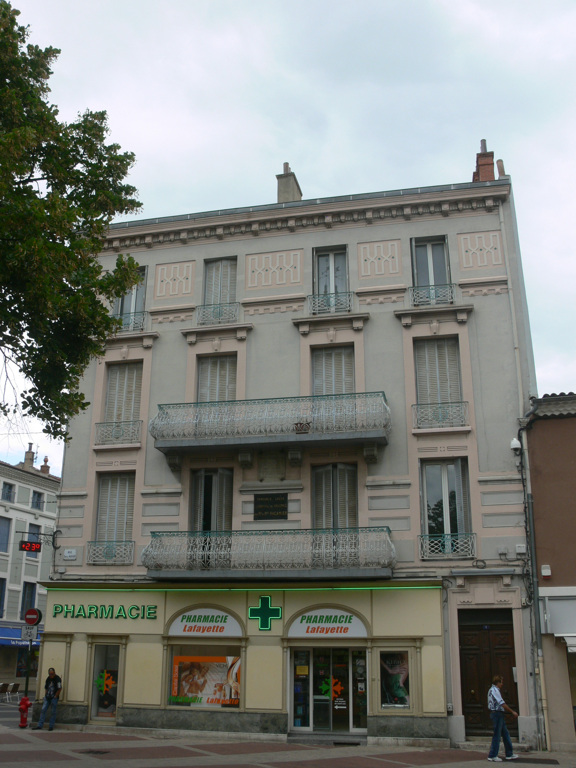 Maison natale d'Emile Augier, à Valence (Drôme)